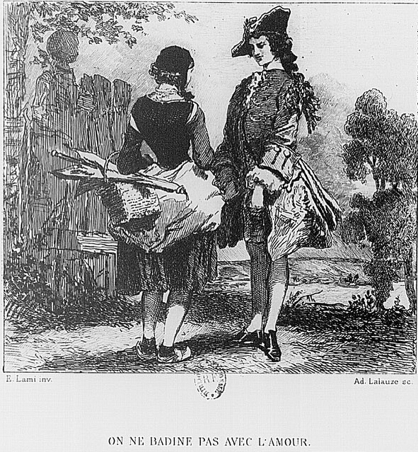 On ne badine pas avec l'amour